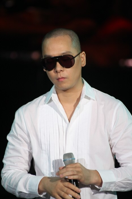 브라운 아이드 소울 나얼